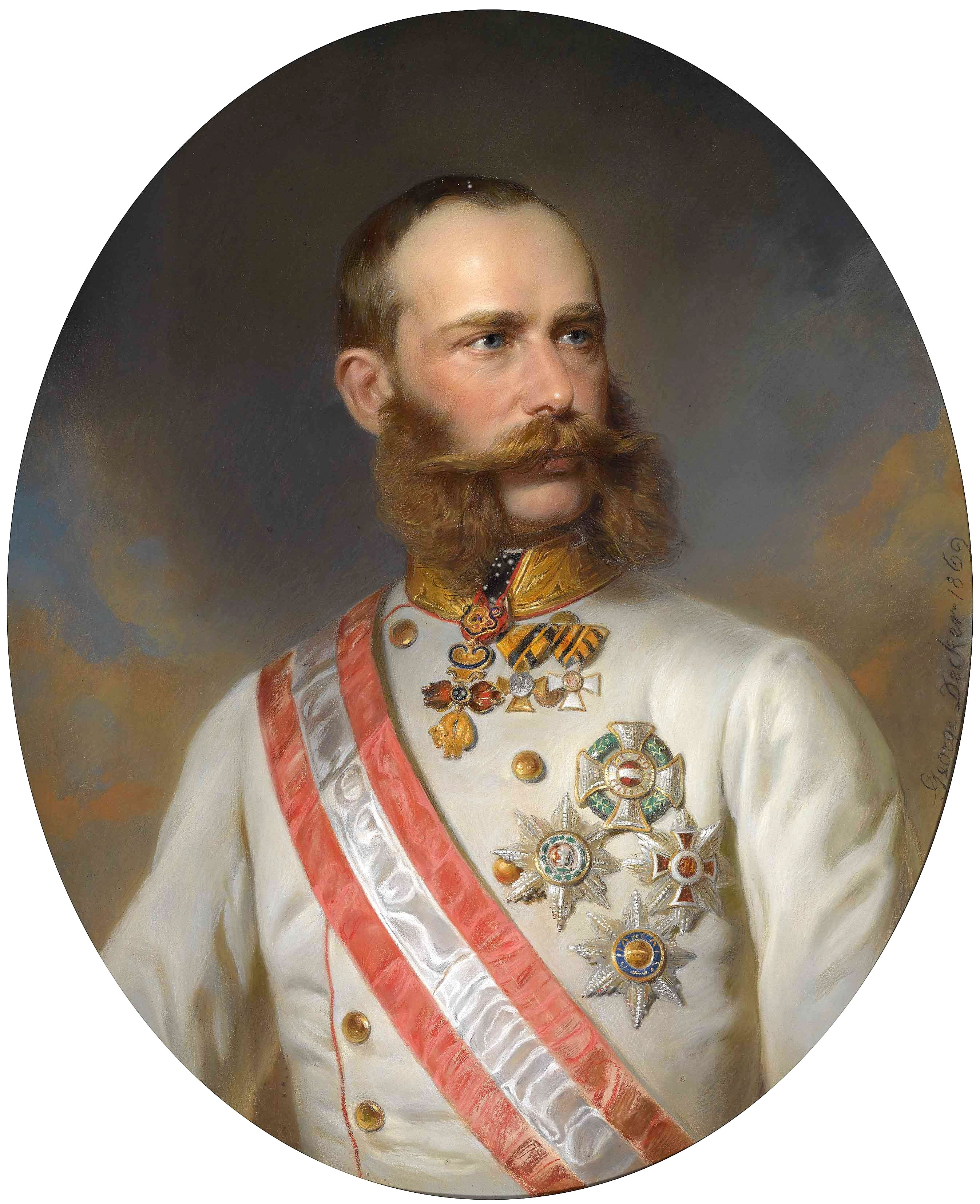 Kaiser Franz Joseph I. von Österreich